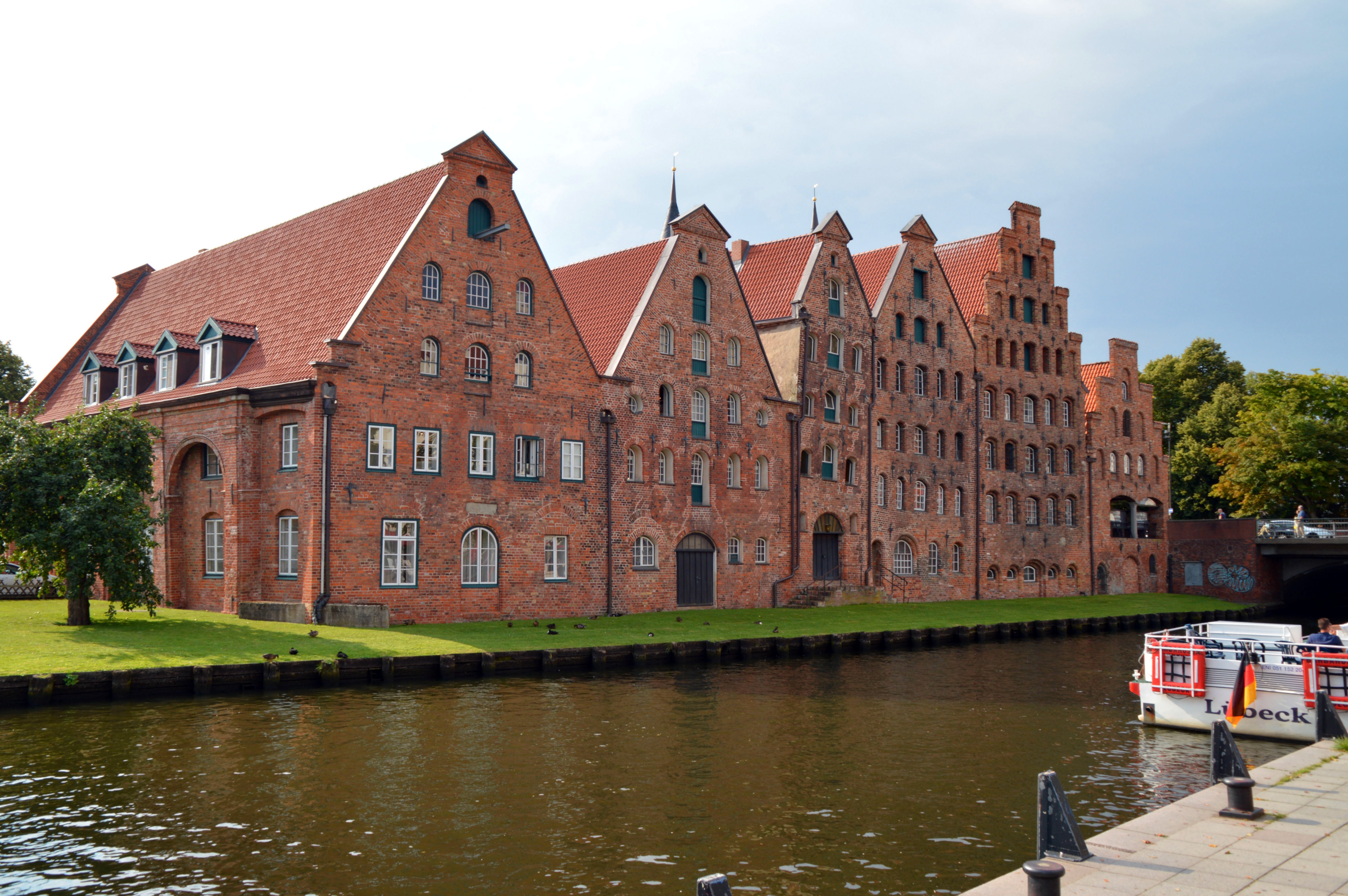 Lübeck Sleeswijk-Holstein Salzspeicher Duitsland